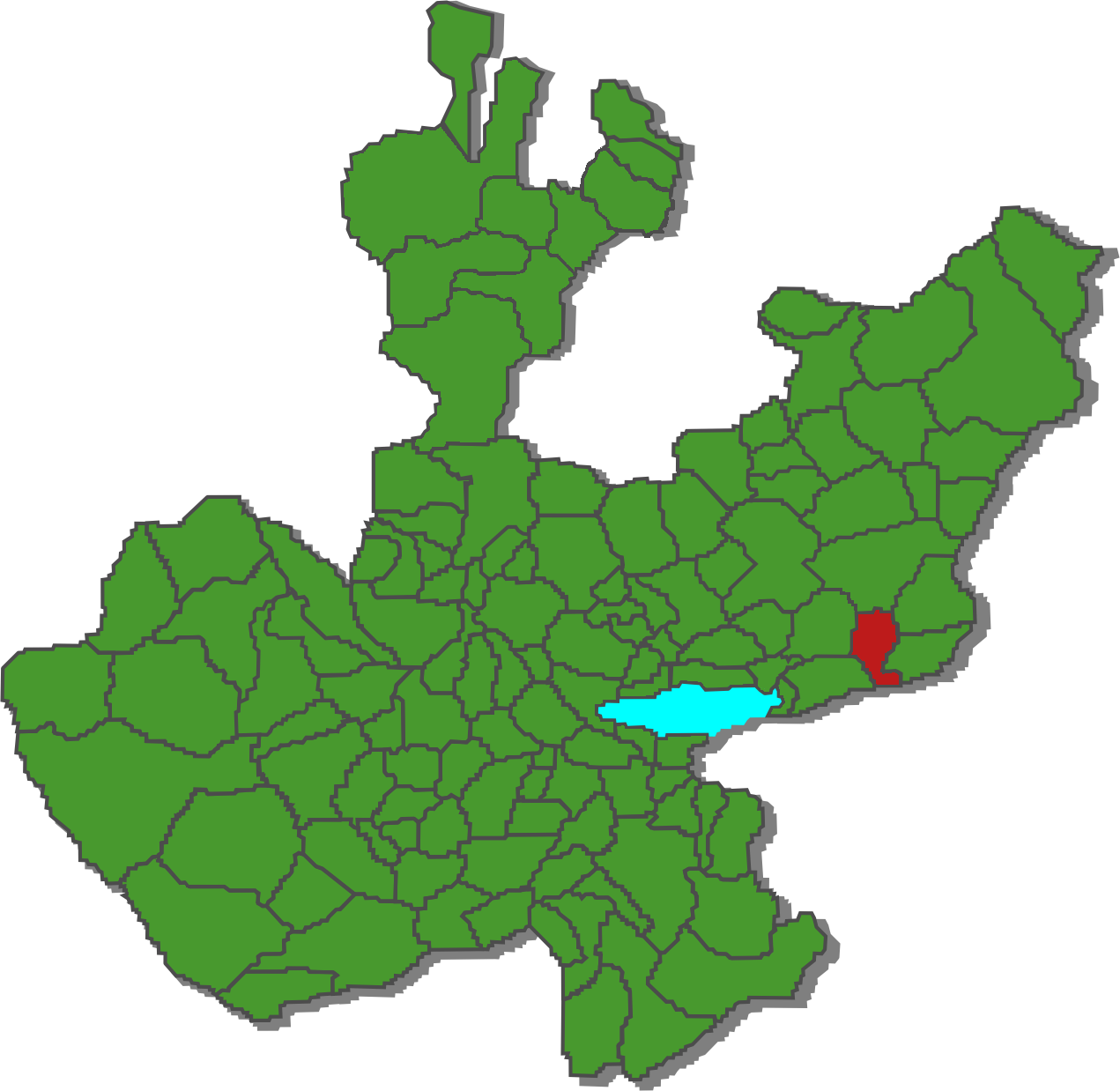 Ubicacion del municipio Ayotlan en el mapa de Jalisco